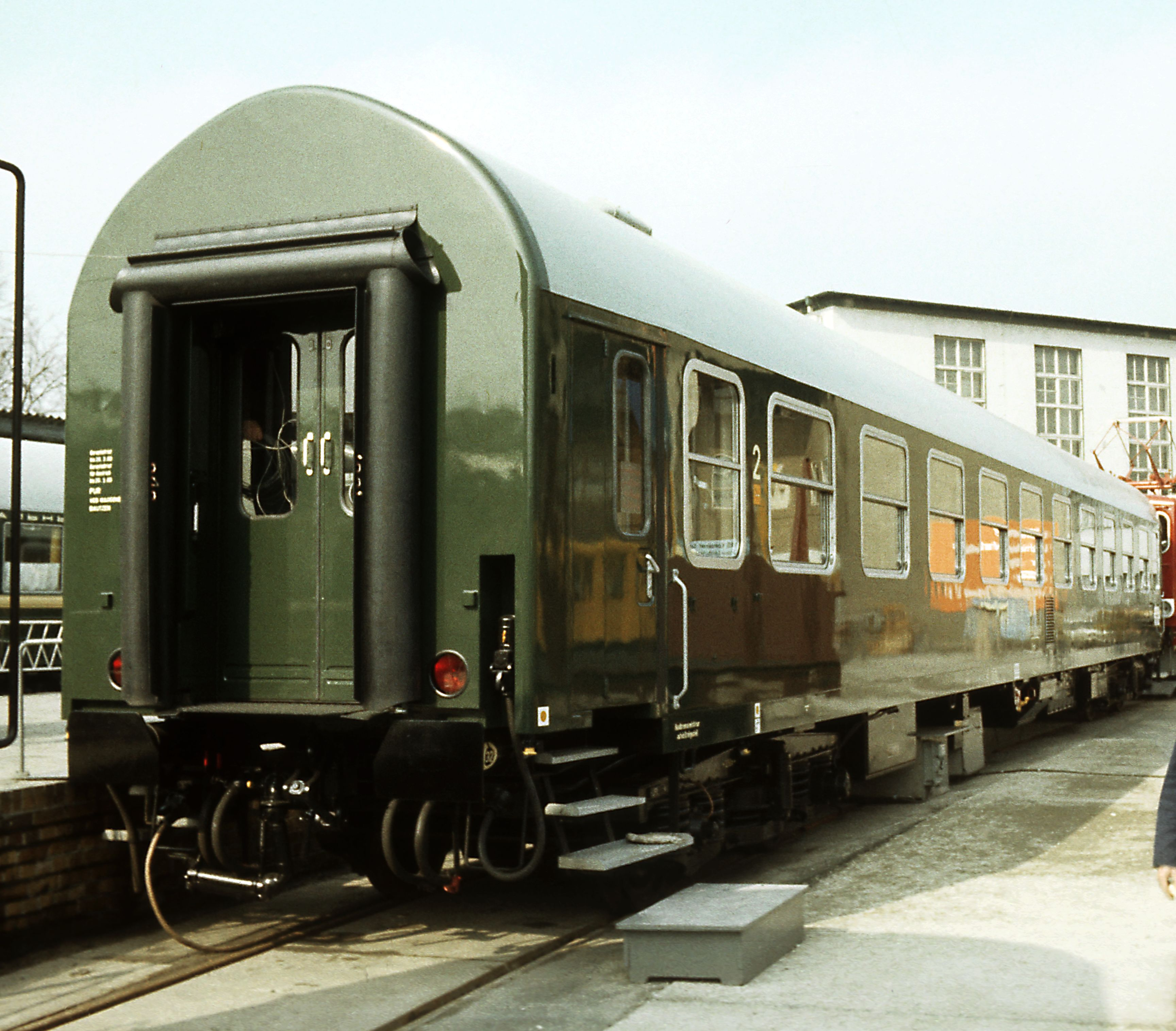 Liegewagen Y/B70, UIC-Typ Y für die Deutsche Reichsbahn auf der Leipziger Frühjahrsmesse 1979